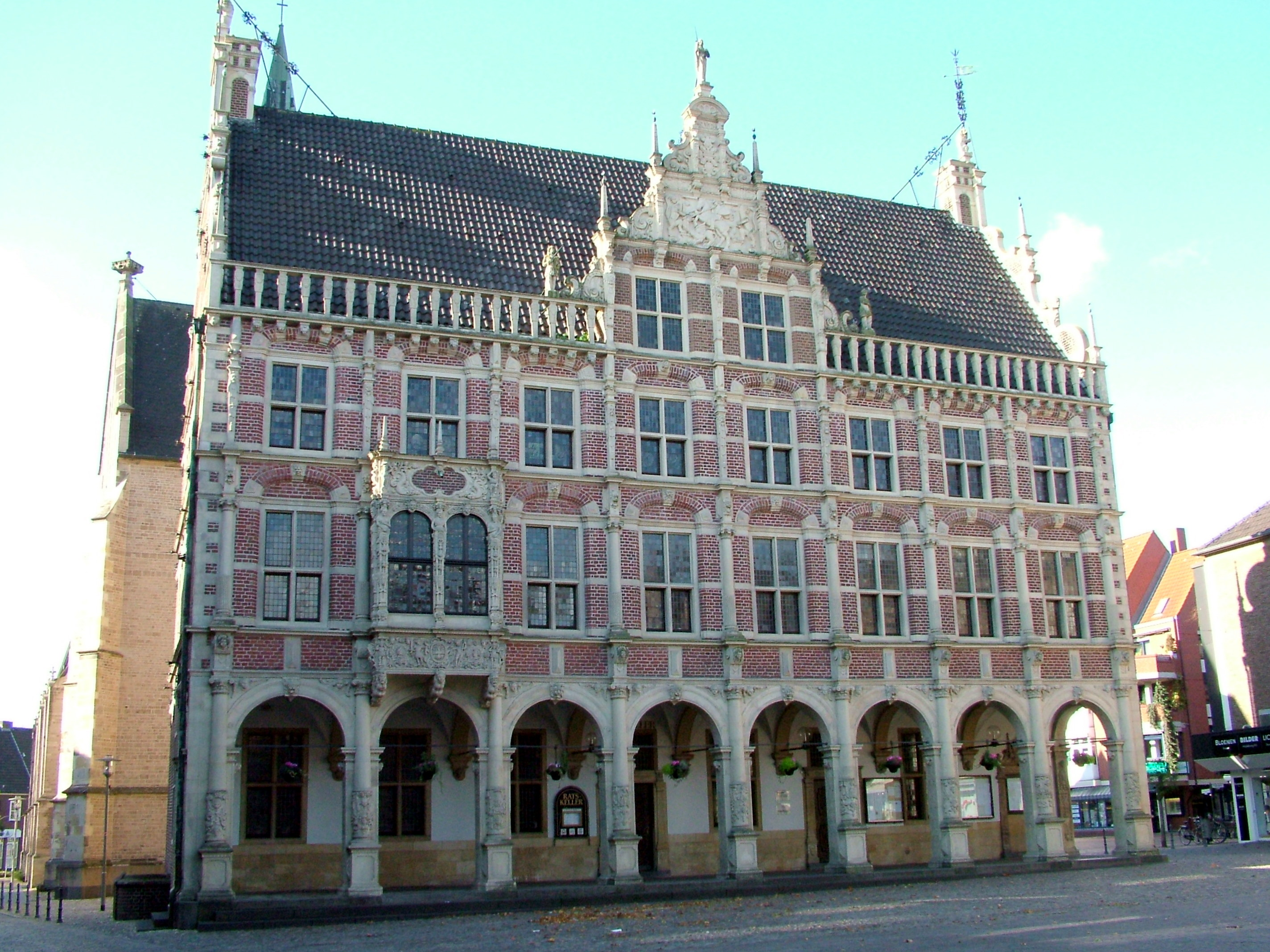 Bocholt, Rathaus